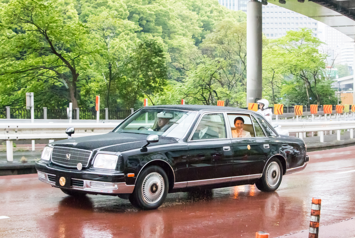 令和元年5月1日、徳仁天皇即位日に御料車（トヨタ・センチュリーロイヤル）で移動する雅子皇后。